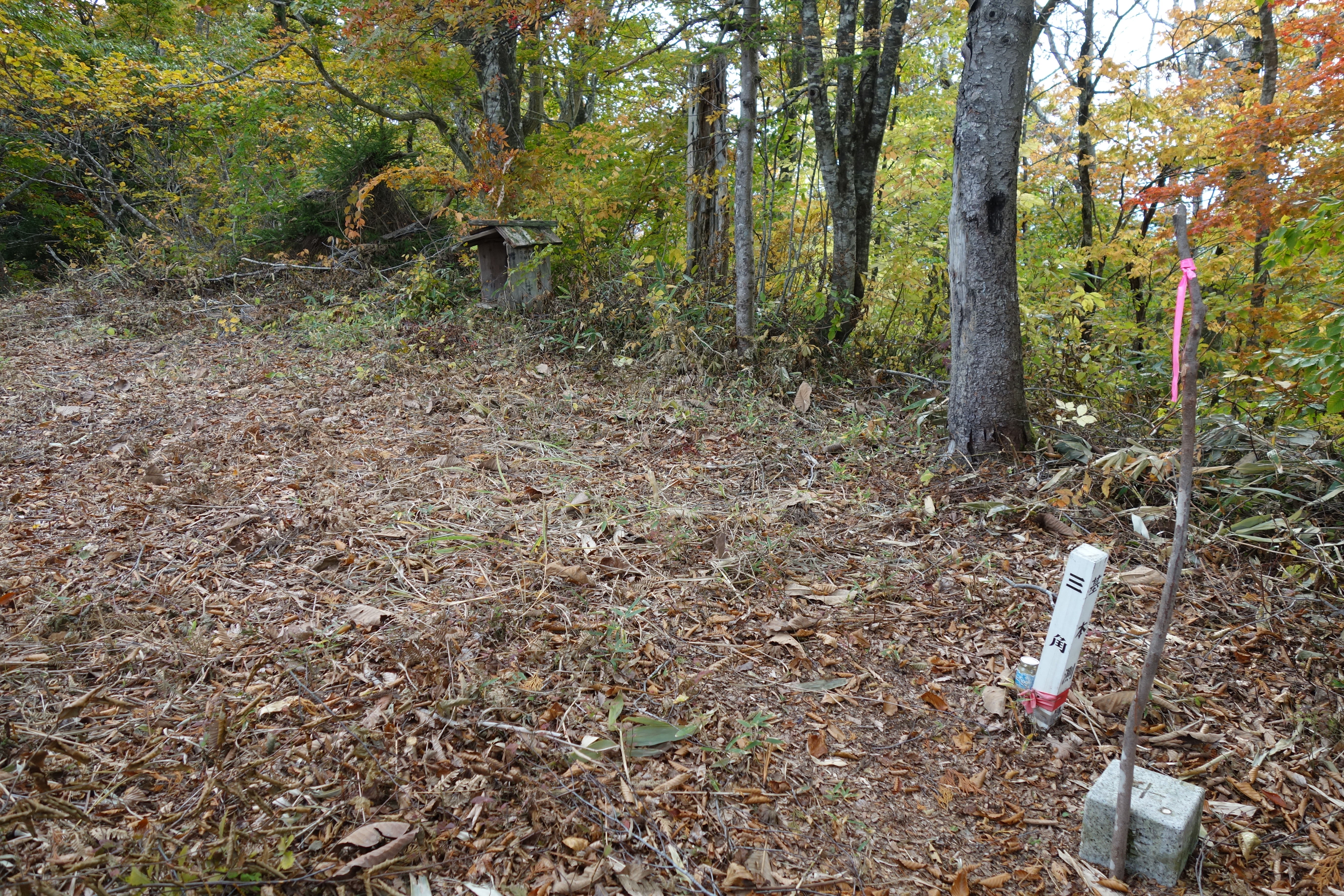 北秋田市と上小阿仁村の境にある姫ヶ岳山頂 一等三角点と石仏が収められている小祠がある。